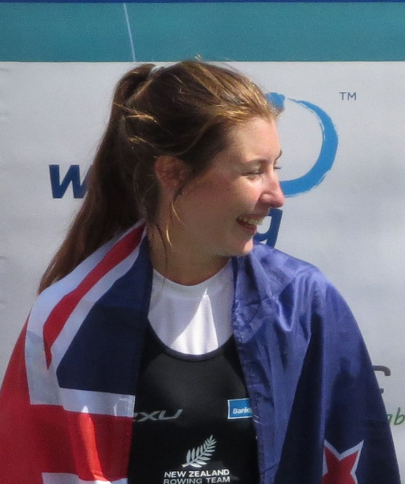 Zoe McBride in September 2015